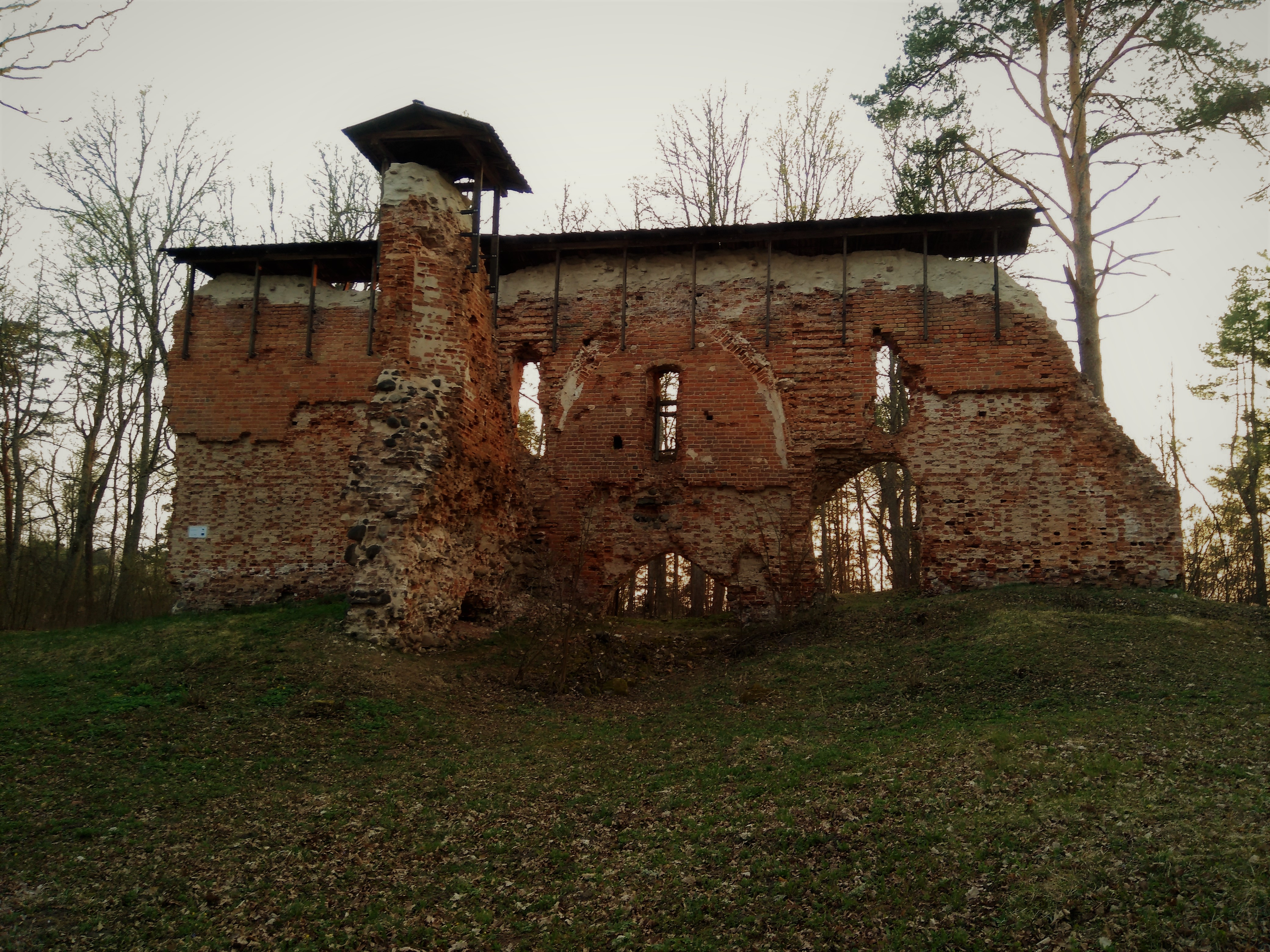 Pealinnuse kirdeküljel asus värav ja väravatorn